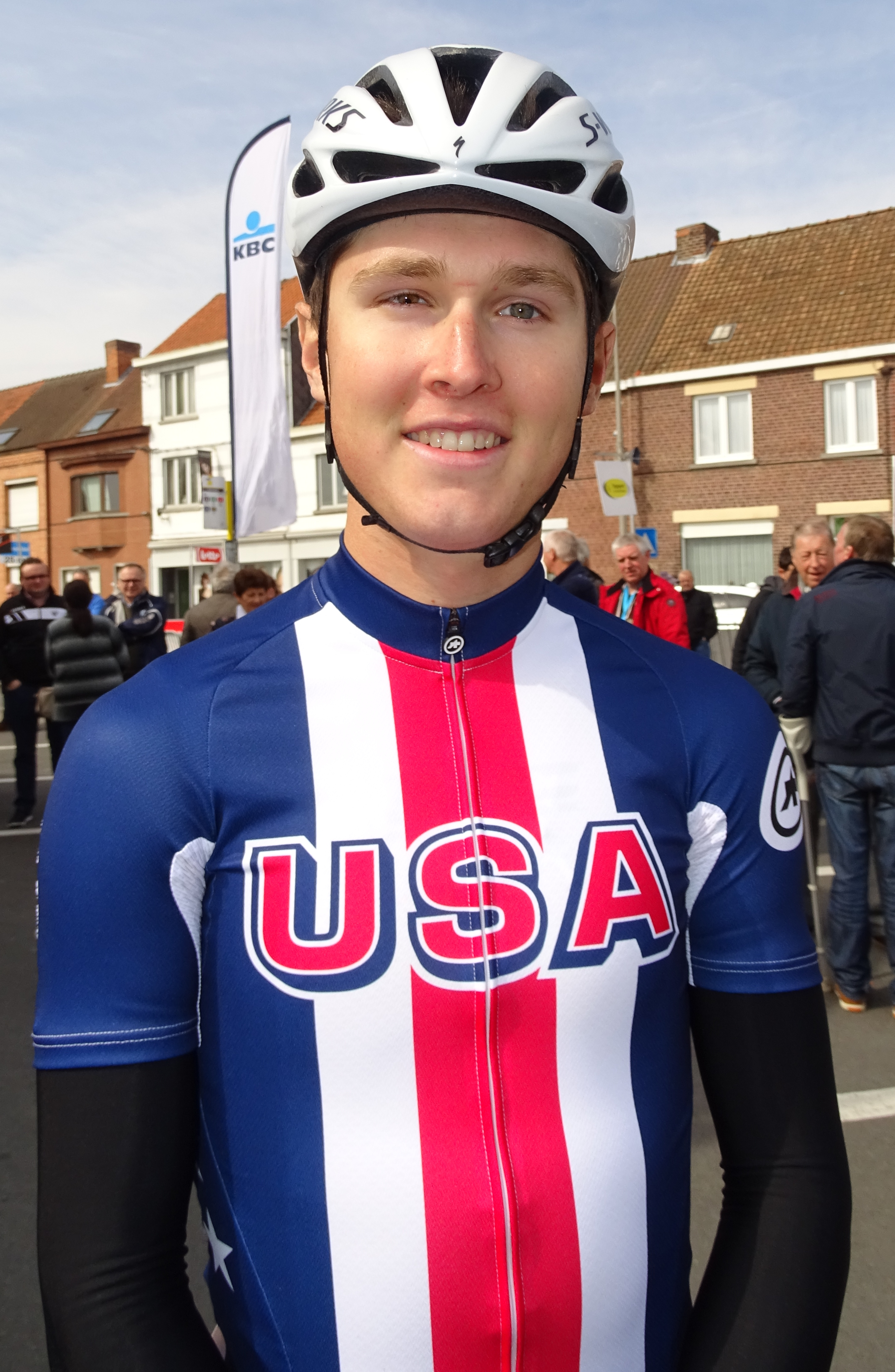 Reportage réalisé le samedi 9 avril à l'occasion du départ et de l'arrivée du Tour des Flandres espoirs 2016 à Audenarde, Belgique.